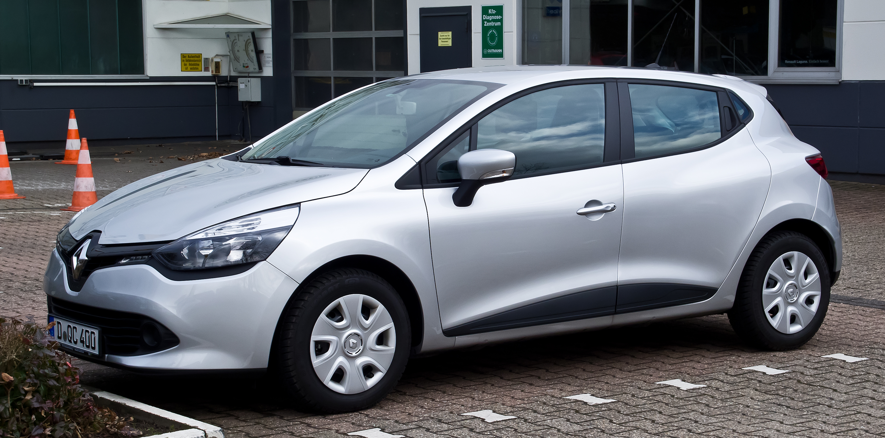 Renault Clio Expression (IV)